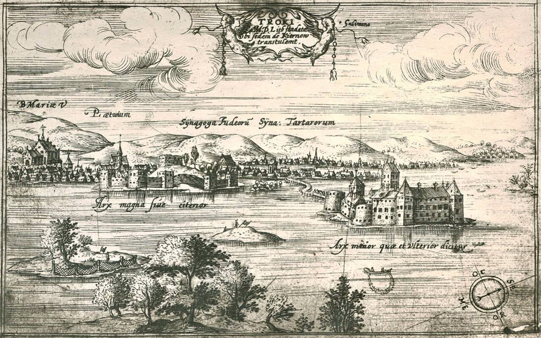 Беларуская (тарашкевіца): Трокі (Troki). Панарама места